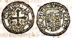 Il 21 gennaio 1634 venne emesso a Torino il Nuovo bando delle monete basse di zeche forastiere, e specialmente delle improntate al piede del presente ordine: sebbene la zecca di Mirandola non fosse esplicitamente nominata in tale bando, vi è però raffigurata in calce questa moneta mirandolese.